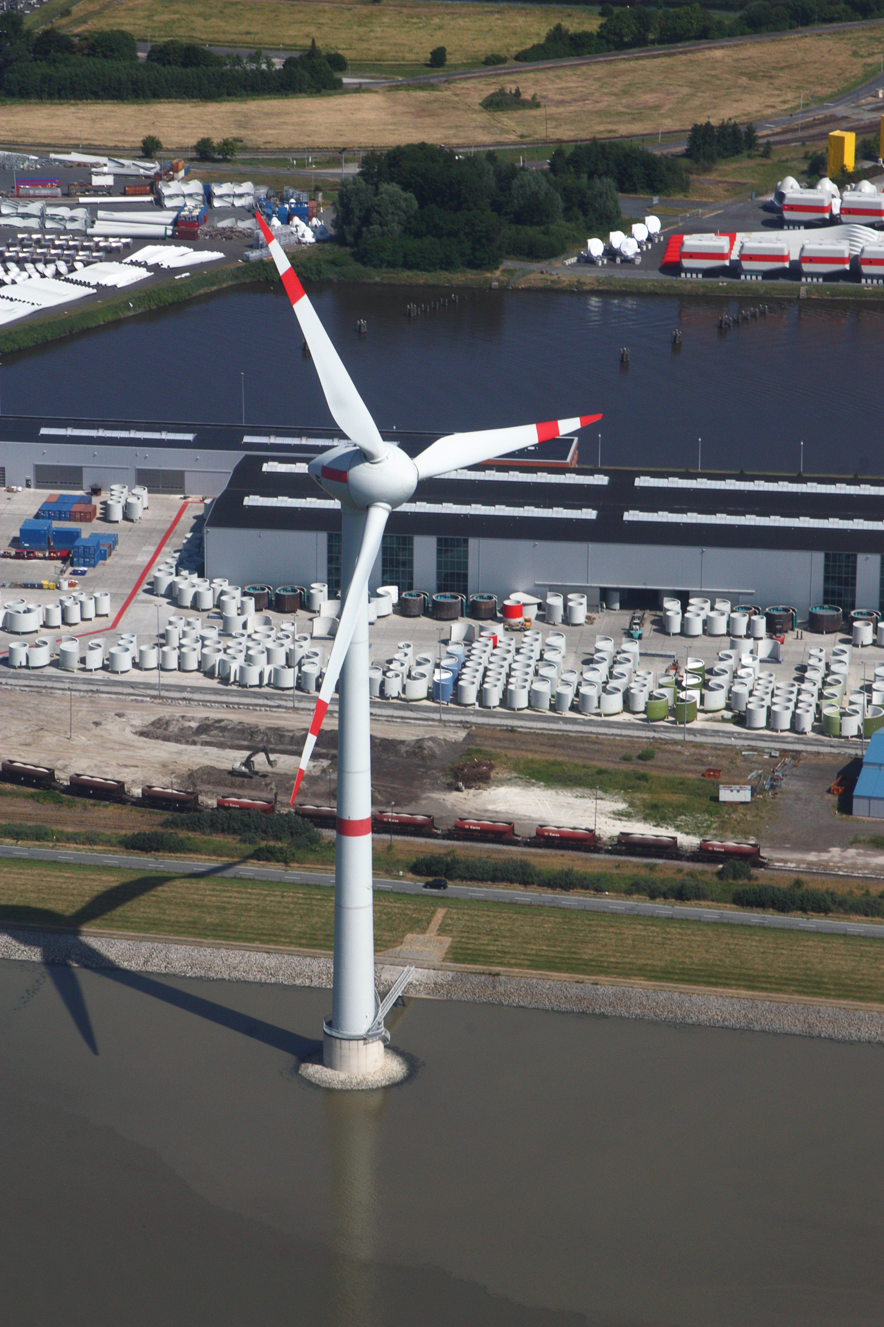 Flug über Emden; Flughöhe 1500 ft; Juli 2010; Originalfoto bearbeitet: Tonwertkorrektur und Bild geschärft mit Hochpassfilter